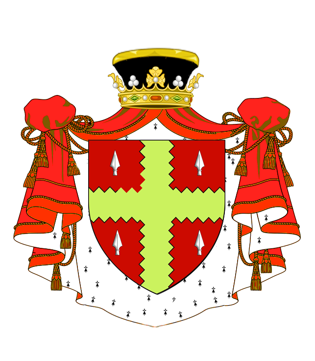 Armes de lafaamille Le Gouz de Saint-Seine avec ornements de président à mortier de parlement